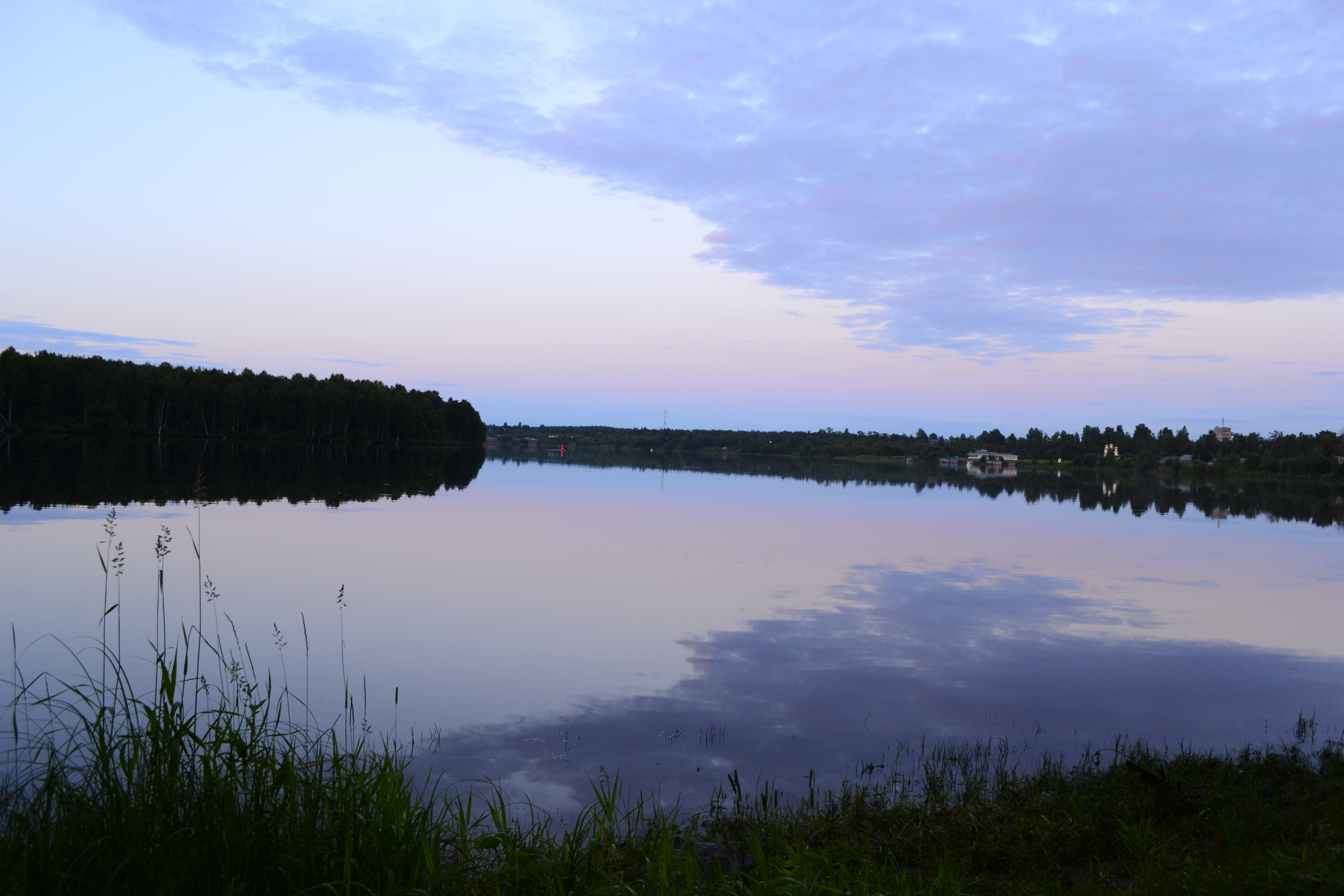 Svir Lodeinoje Polest läbi voolamas